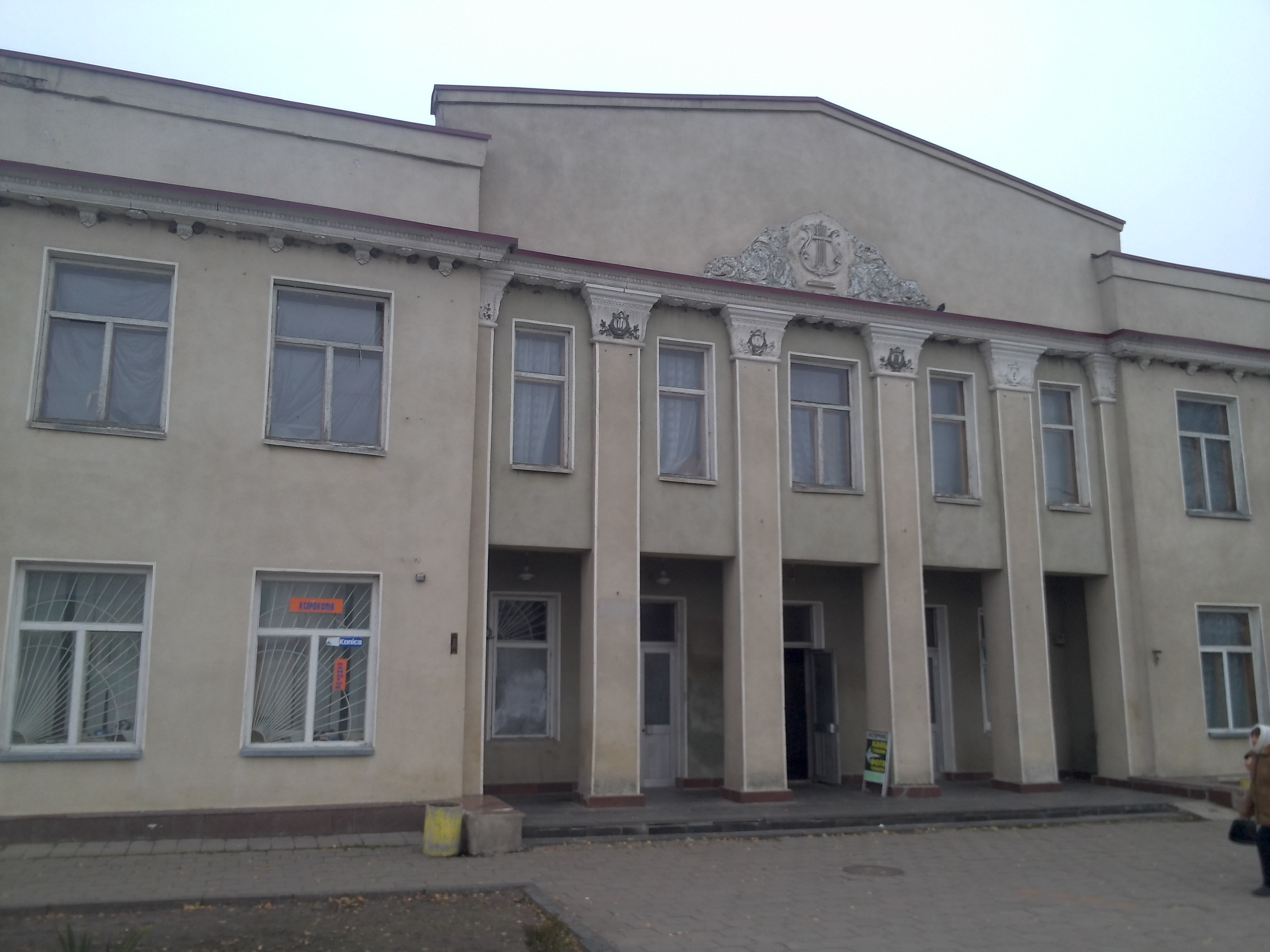 м. Малин. Районний Будинок культури